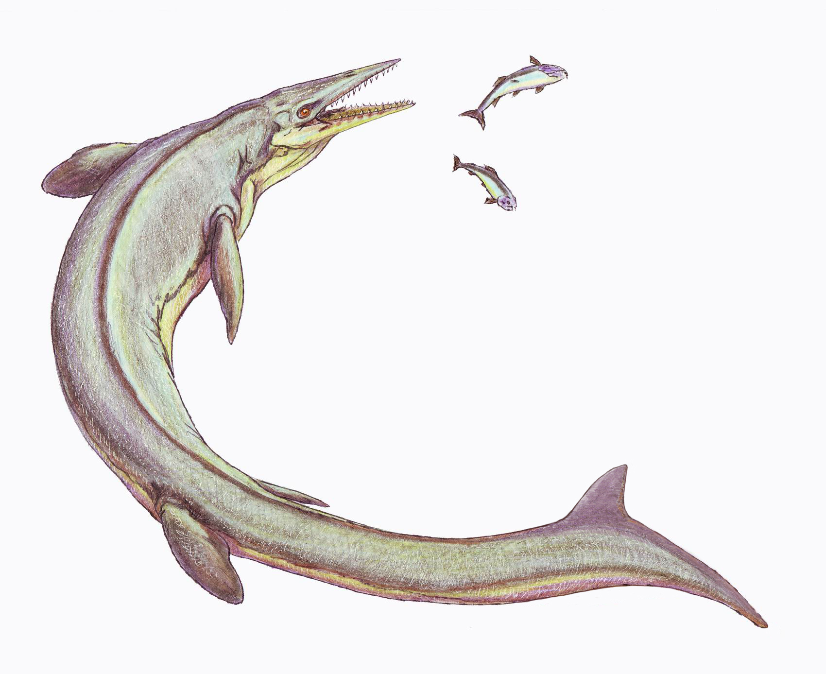 Clidastes prophyton